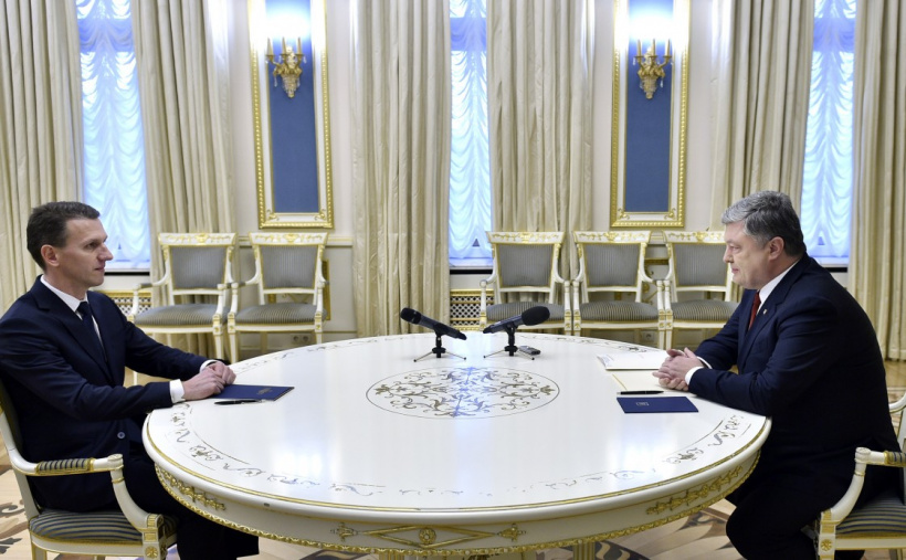 Президент України Петро Порошенко призначив Романа Трубу на посаду Директора Державного бюро розслідувань